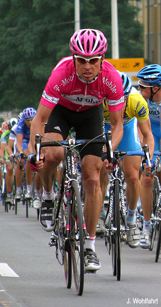 Jan Ullrich bei der Deutschlandtour 2005 in Bonn